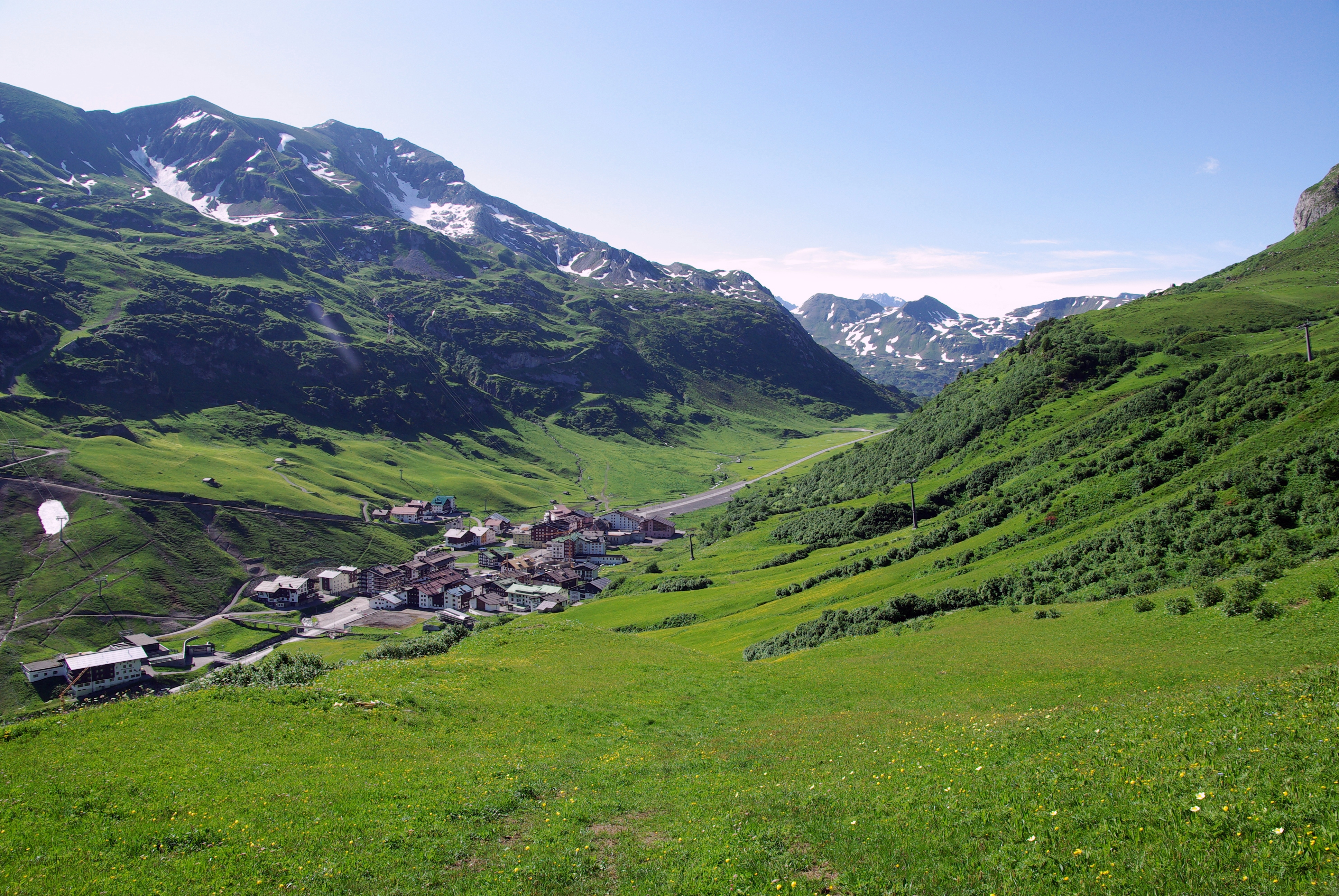 Blick auf Zürs und den Trittkopf (2.720 m)